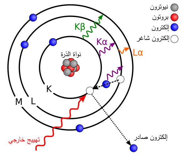 نموذج الذرَّة (رسم بيانيّ).